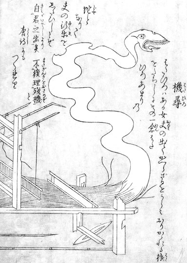 Hatahiro (機尋) from the Konjaku Hyakki Shūi (今昔百鬼拾遺)